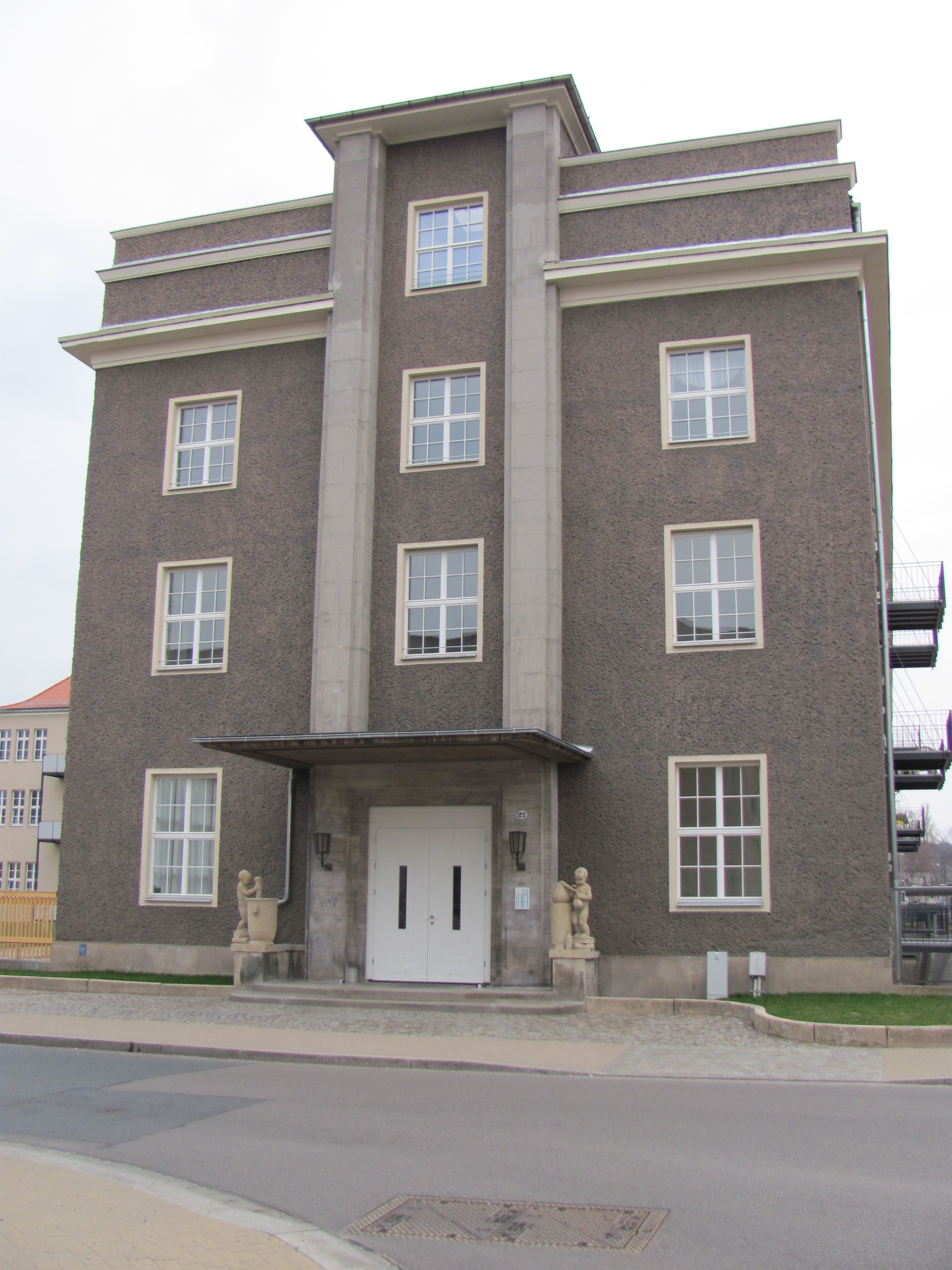 Radebeul (Gemarkung),Straßenfassade, Kunststeinplastiken Kinder mit pharmazeutischen Geräten von Burkhart Ebe